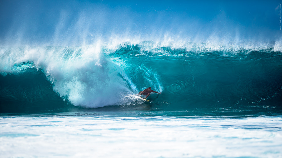 500px provided description: Pipeline Barrel [#surfing ,#hawaii ,#pipeline ,#barrel ,#volcom ,#volcomsurf]